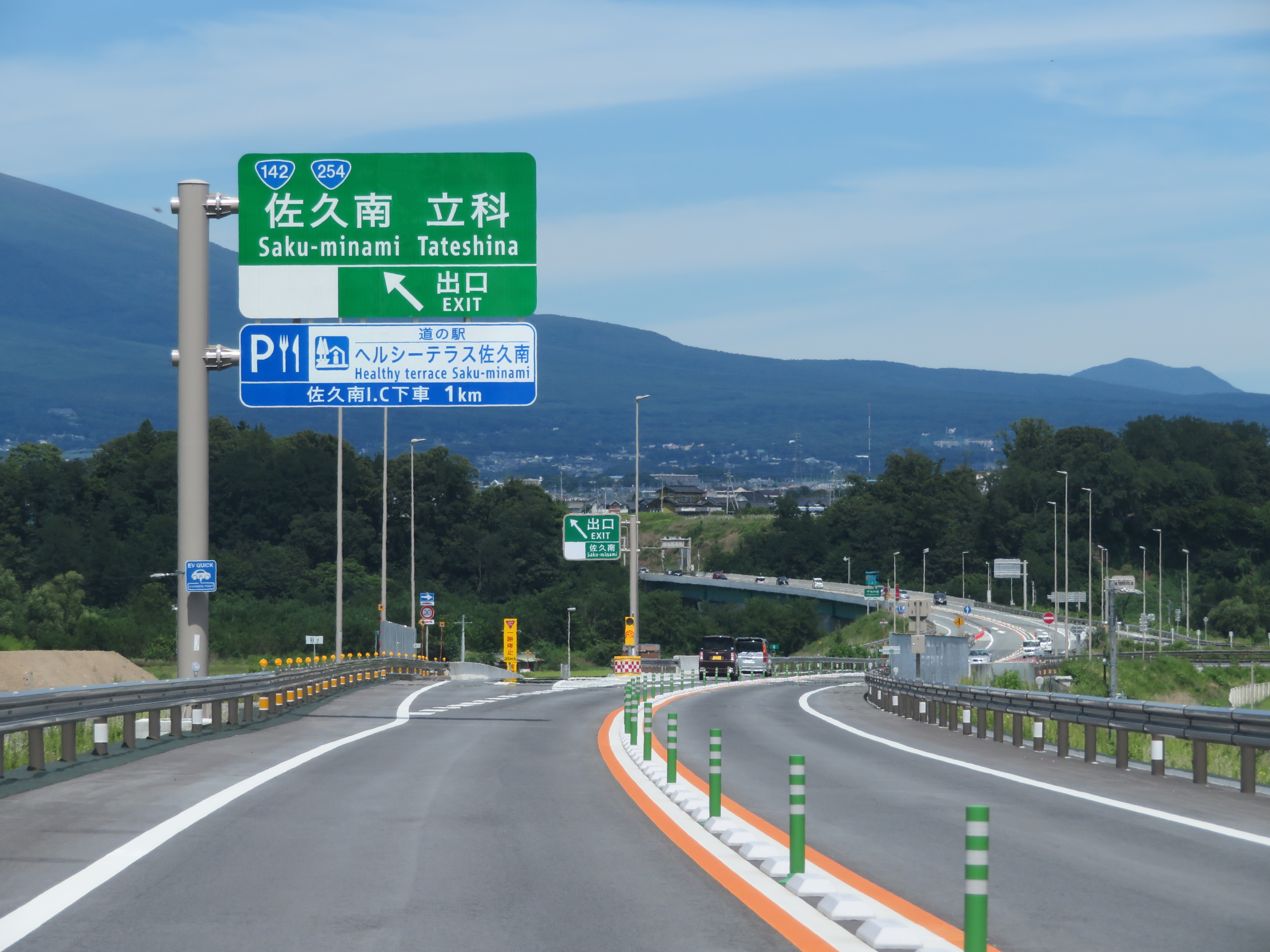 中部横断自動車道佐久南インターチェンジ出口付近（八千穂高原方面側から撮影） Canon PowerShot SX720 HS